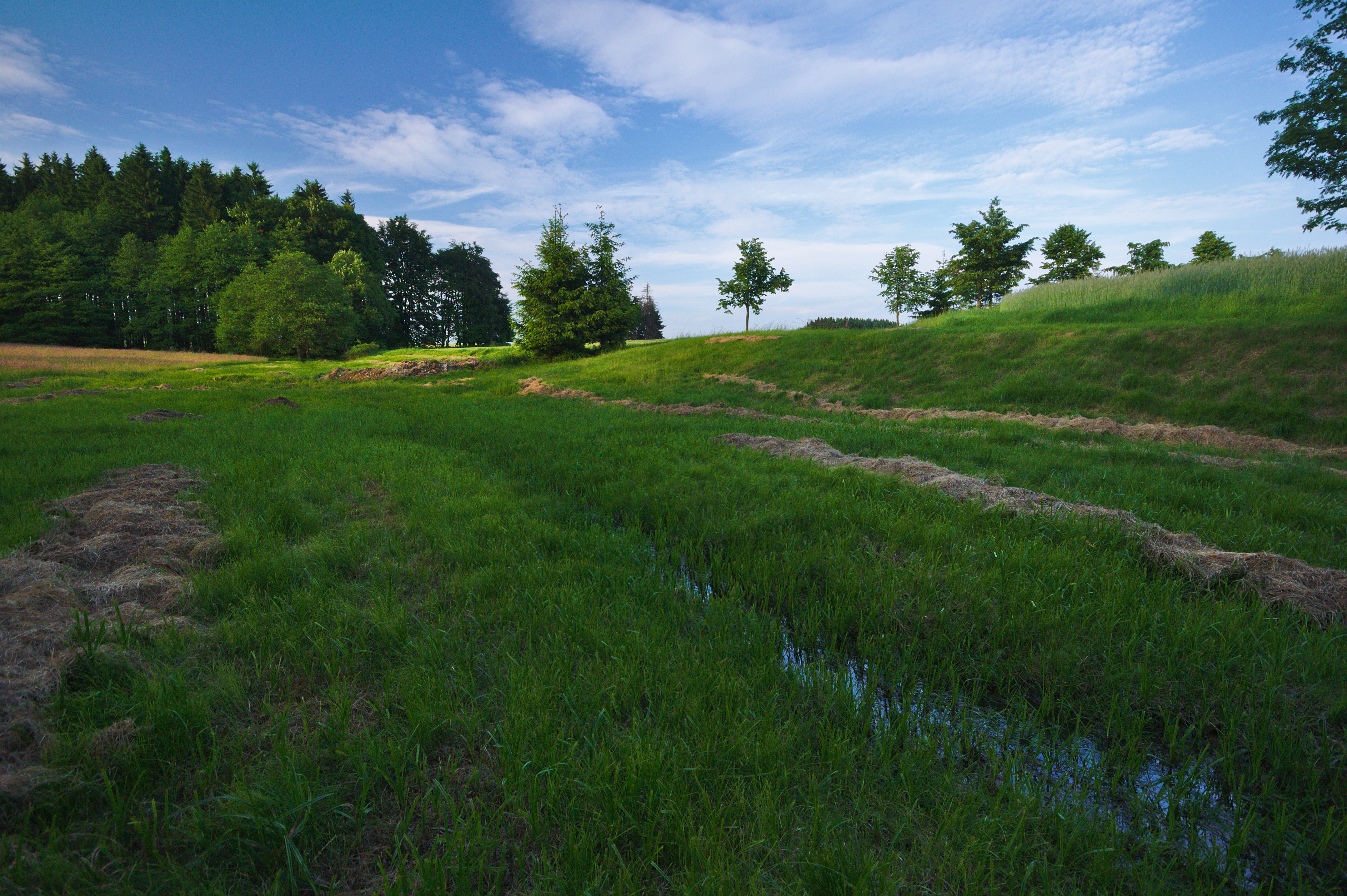 Přírodní památka Louky pod Skalami, okres Prostějov